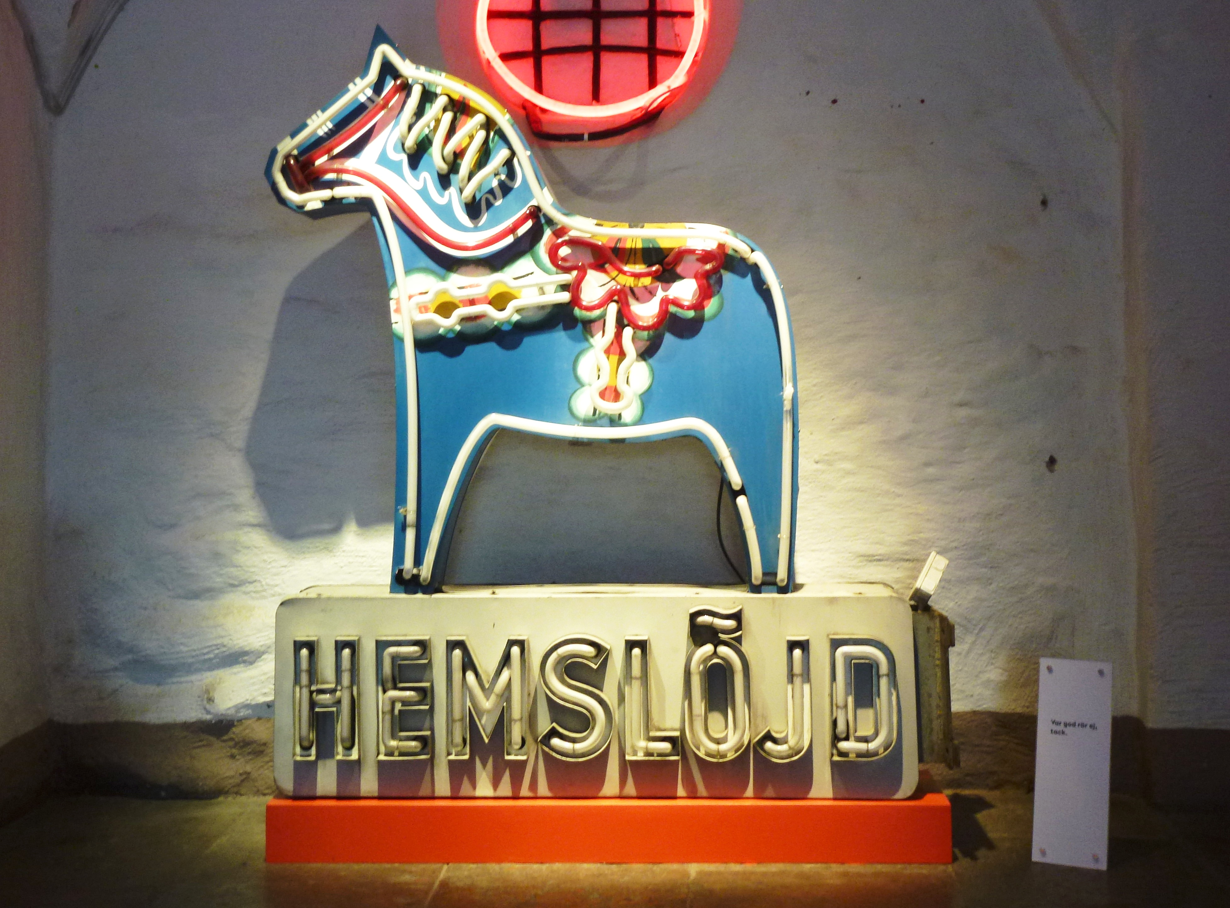 "Hemslöjd" skylt på Stockholms stadsmuseum, ursprungligen fanns den utanför butiken för Föreningen för Svensk Hemslöjd vid Kungsgatan 31 i Stockholm.